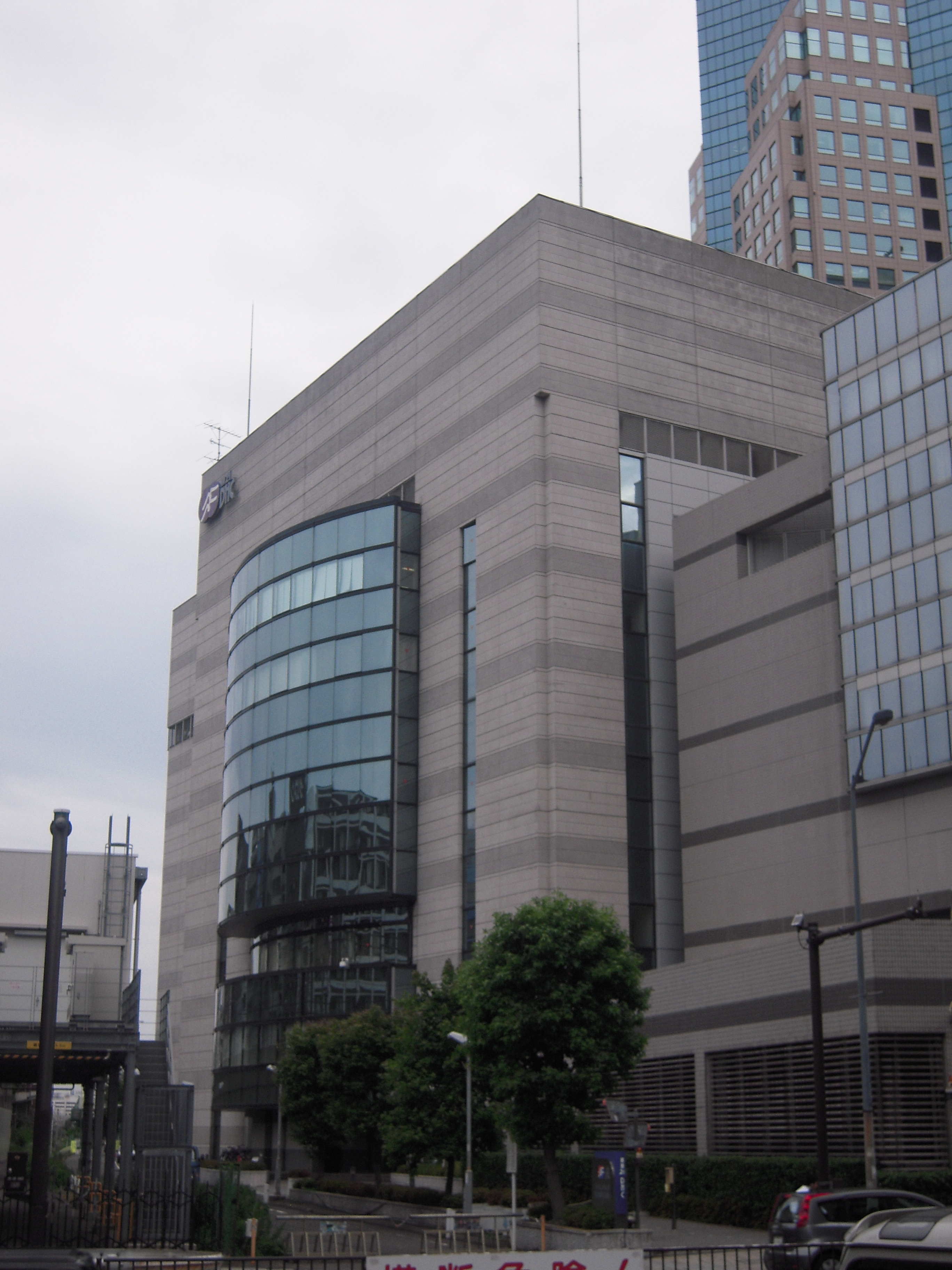 MM21DHC外観